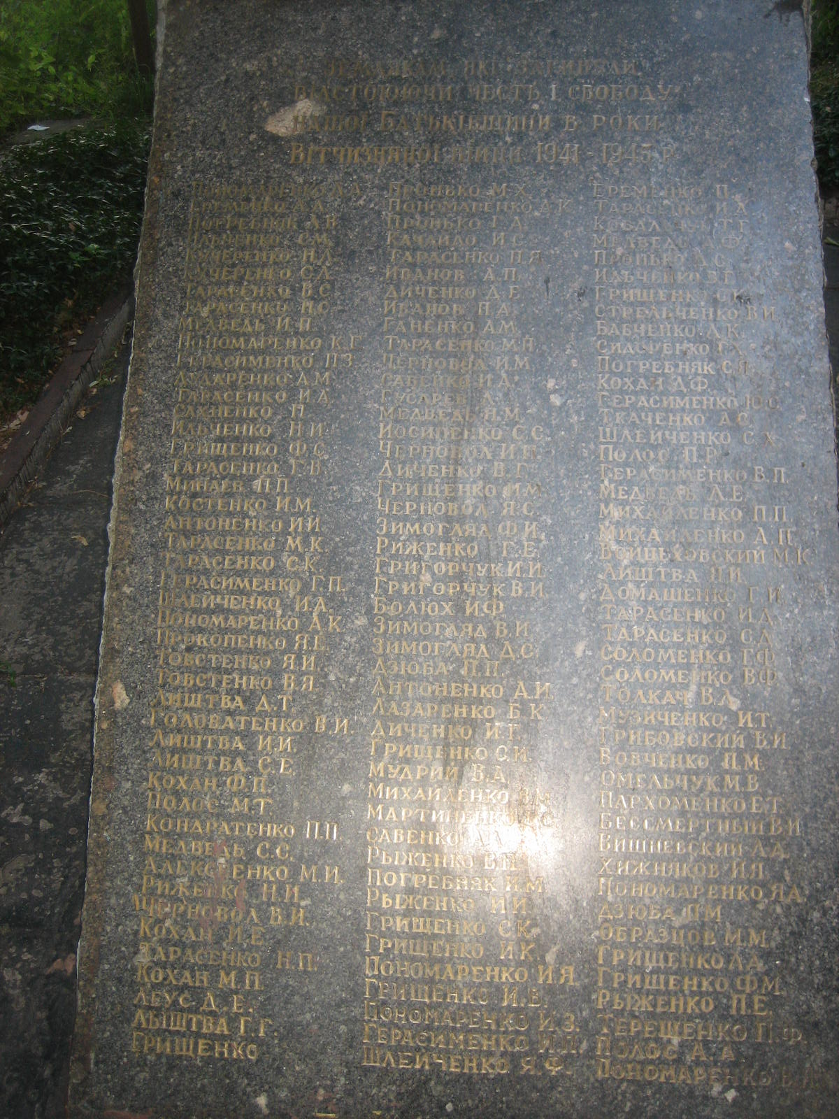 пам'ятник невідомому солдатові (список загиблих селян на фронтах другої світової війни) в селі Шпитьки Києво-Святошинського району Київської області